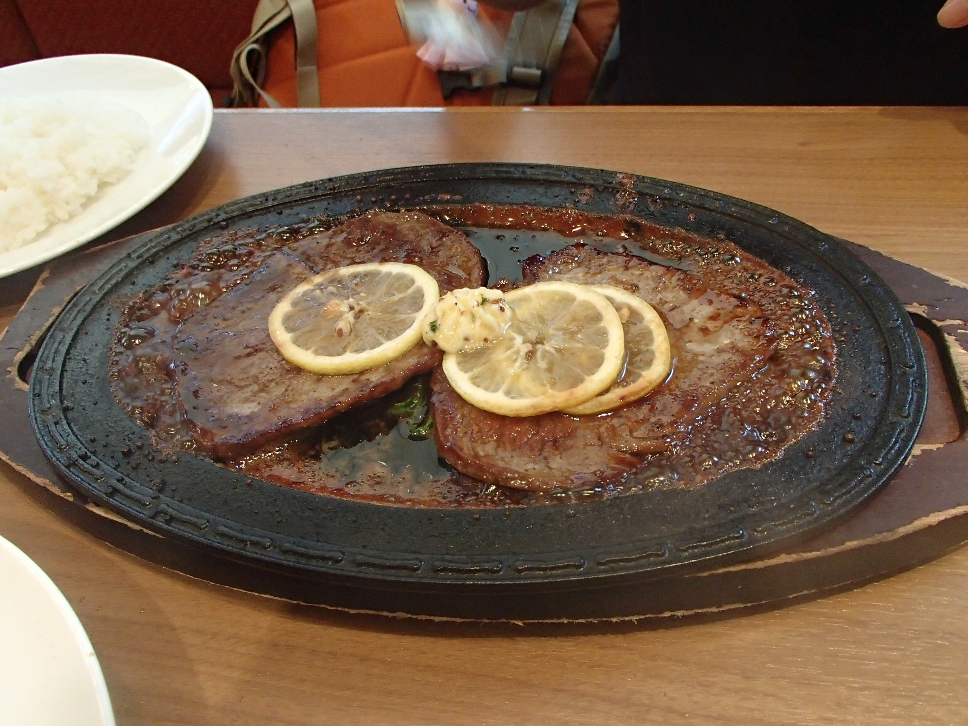 レモンステーキ 蜂の家（佐世保）